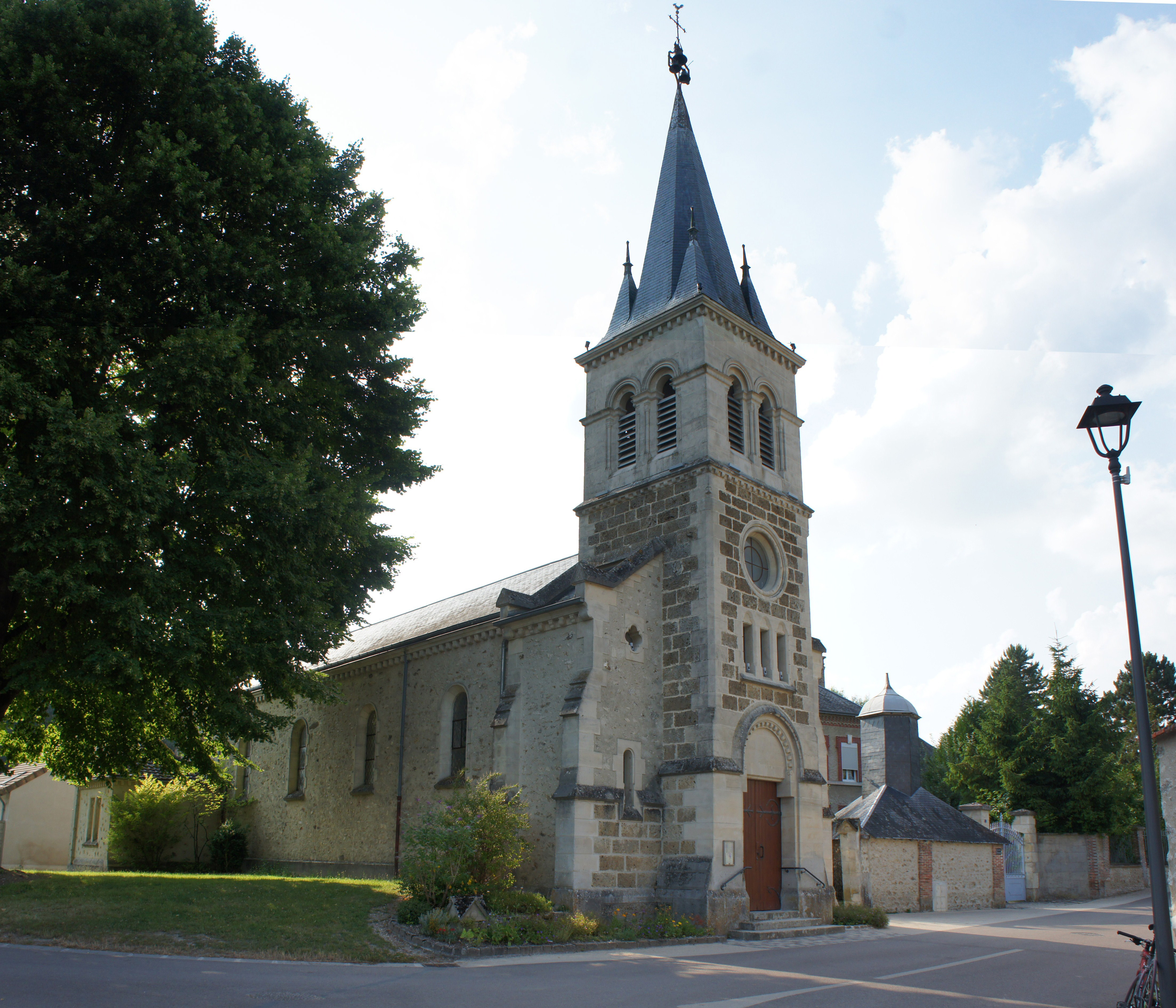 Une vue de .